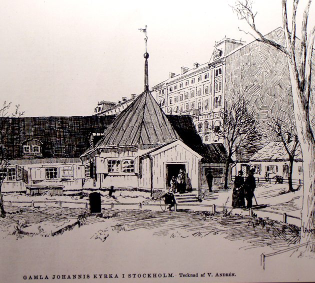 Den gamla träkyrkan i Johannes revs när tegelkyrkan byggdes.